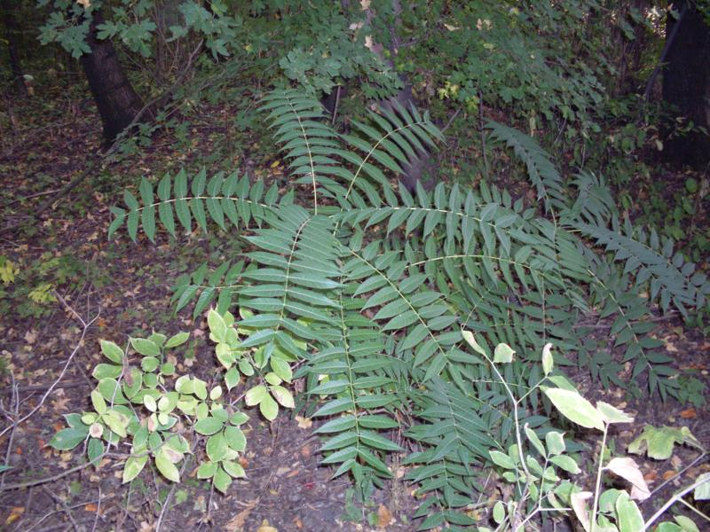 Az invazív Bálványfa (Ailanthus altissima) megjelenése az égerlápon (Erdőtelki Égerláp Természetvédelmi Terület, Heves megye)